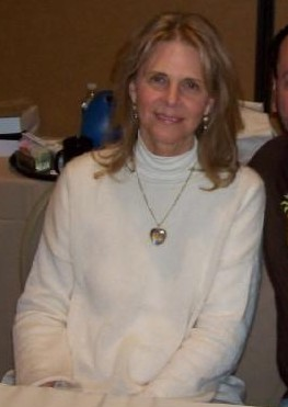 Lindsay Wagner